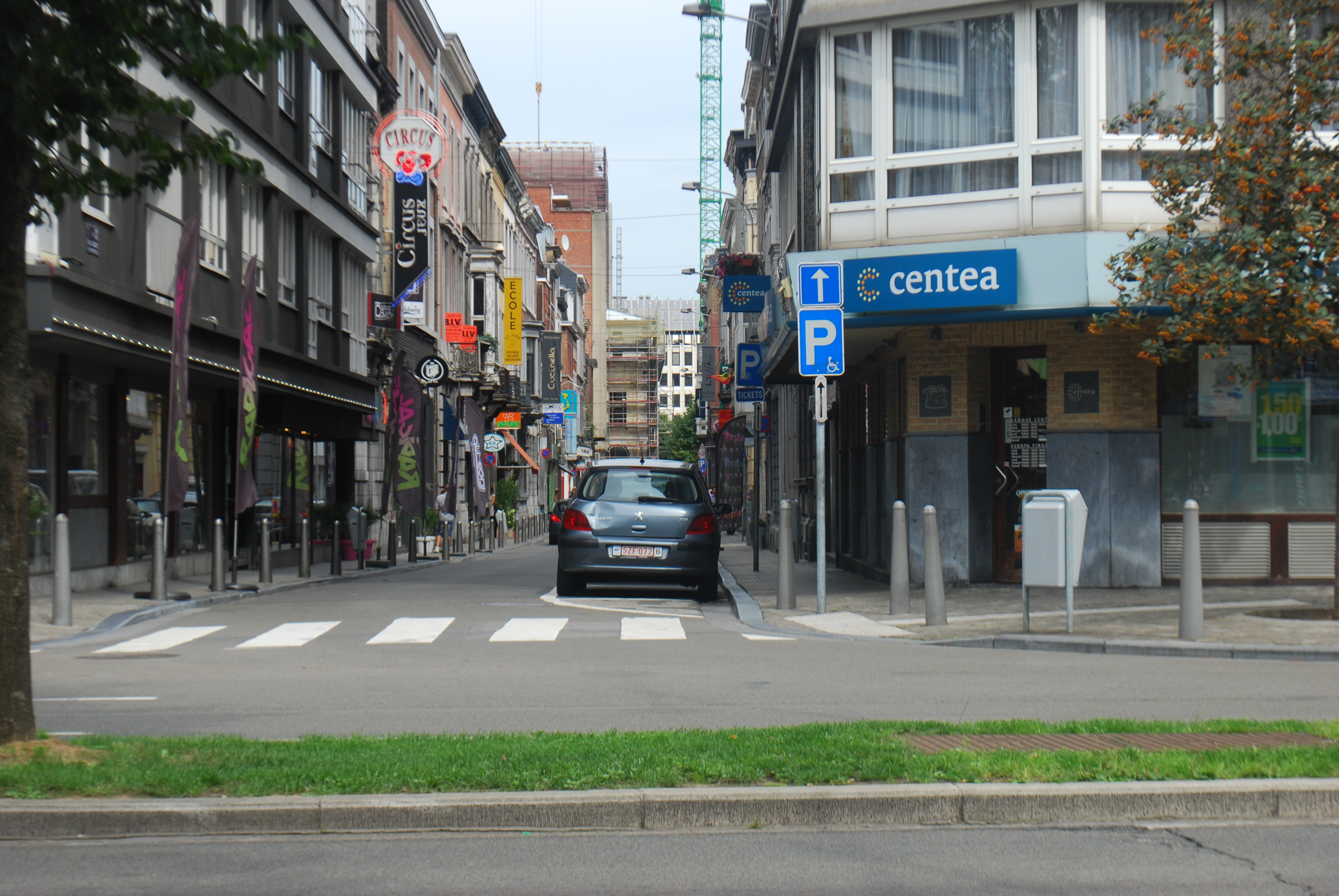 Vue du boulevard de la Sauvenière, à Liège.